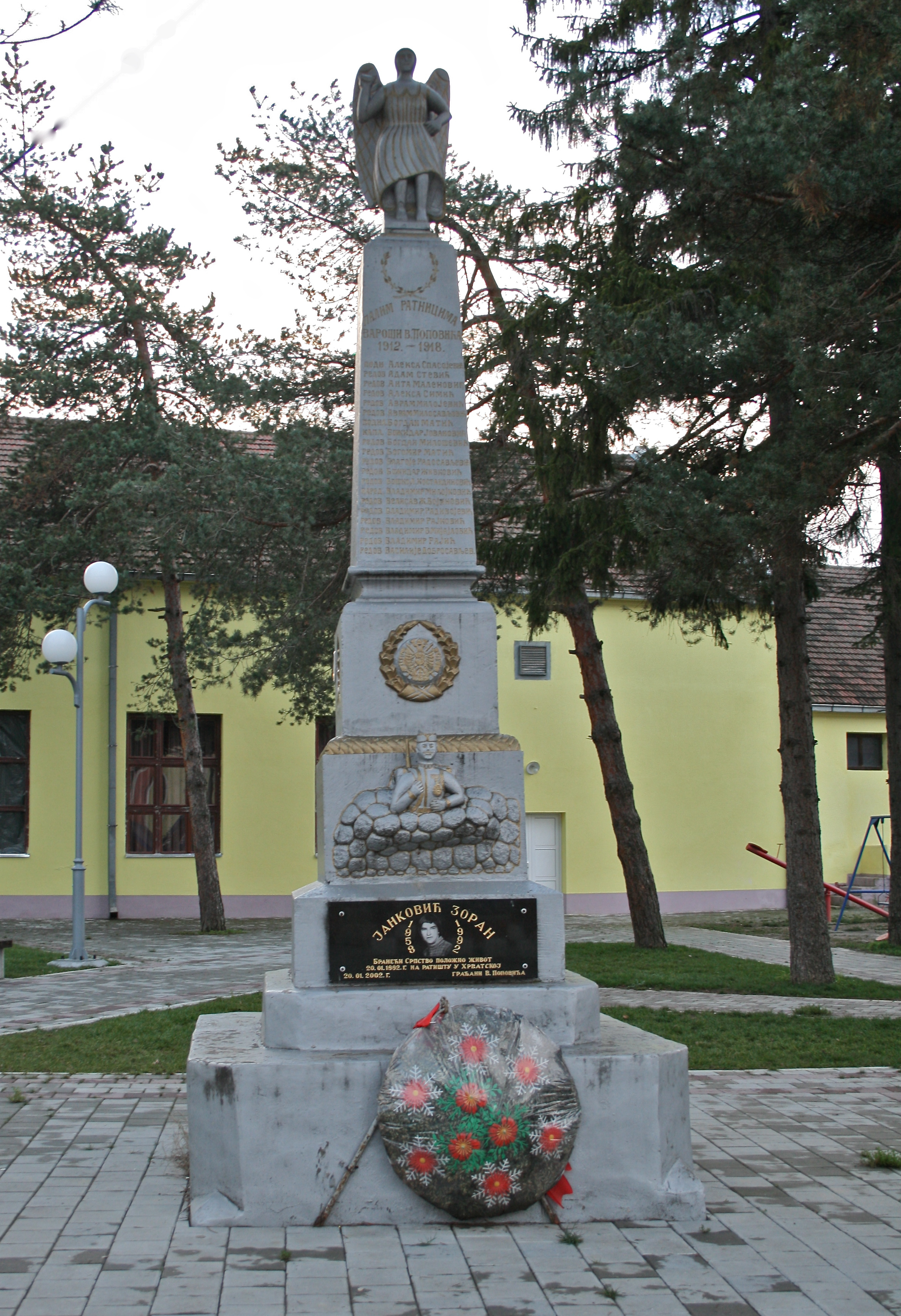 Споменик палим борцима.